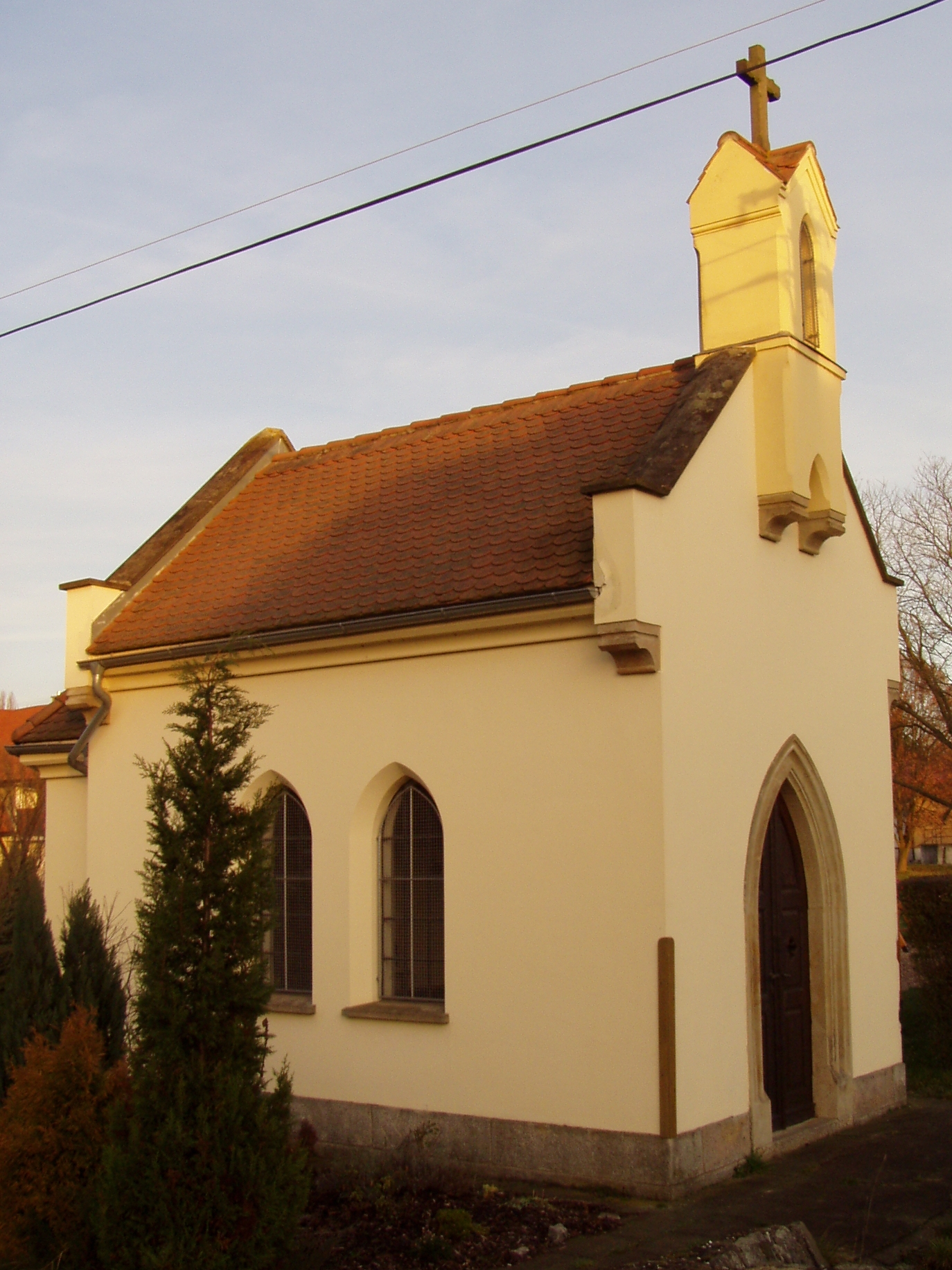 Kaple sv. Andělů strážných ve Zboží